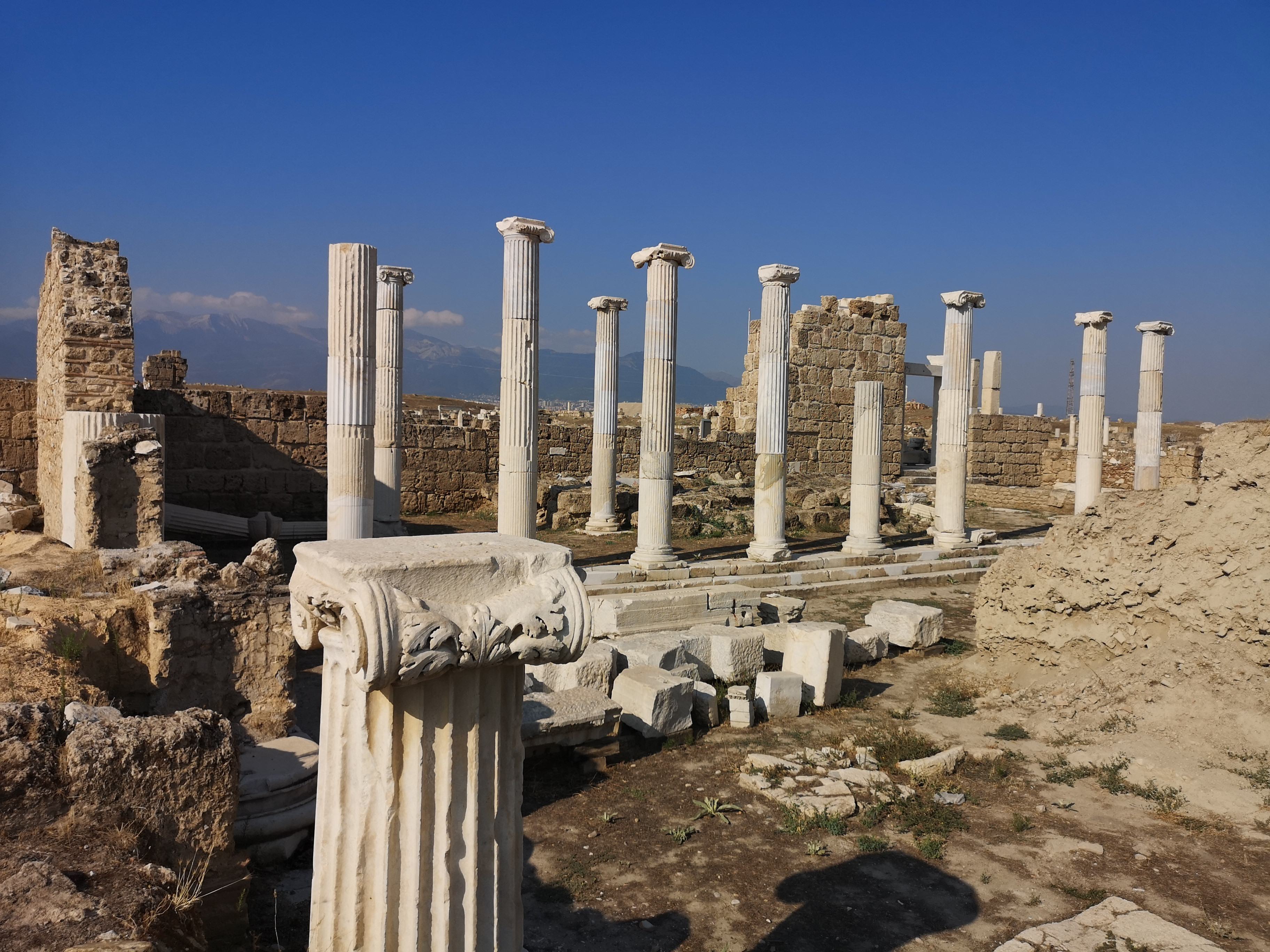 Laodikea Antik Kenti